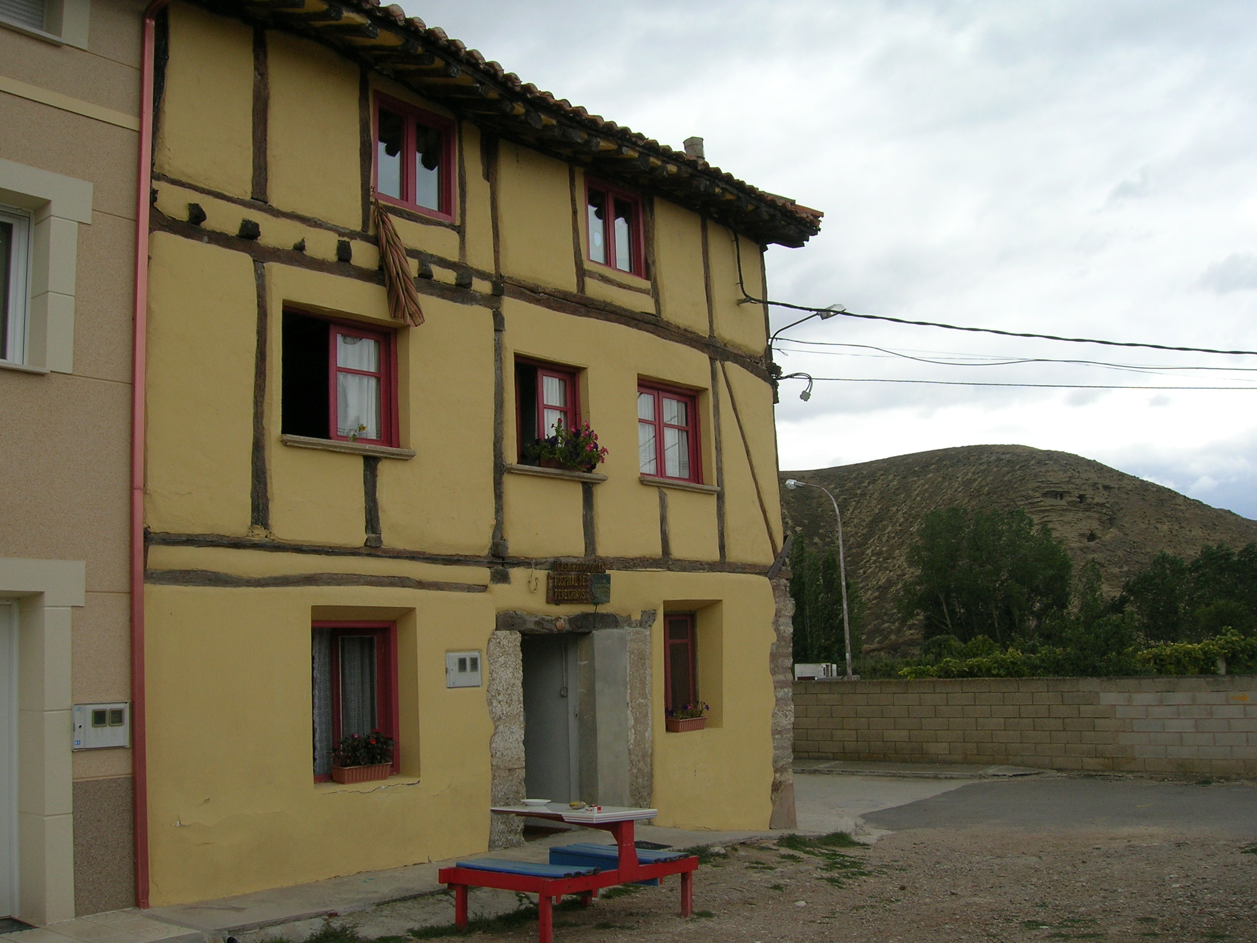 Los albergues parroquiales, ademas de su tranquilidad, tienen ese espíritu peregrino que dificilmente podras encontrar en otros.